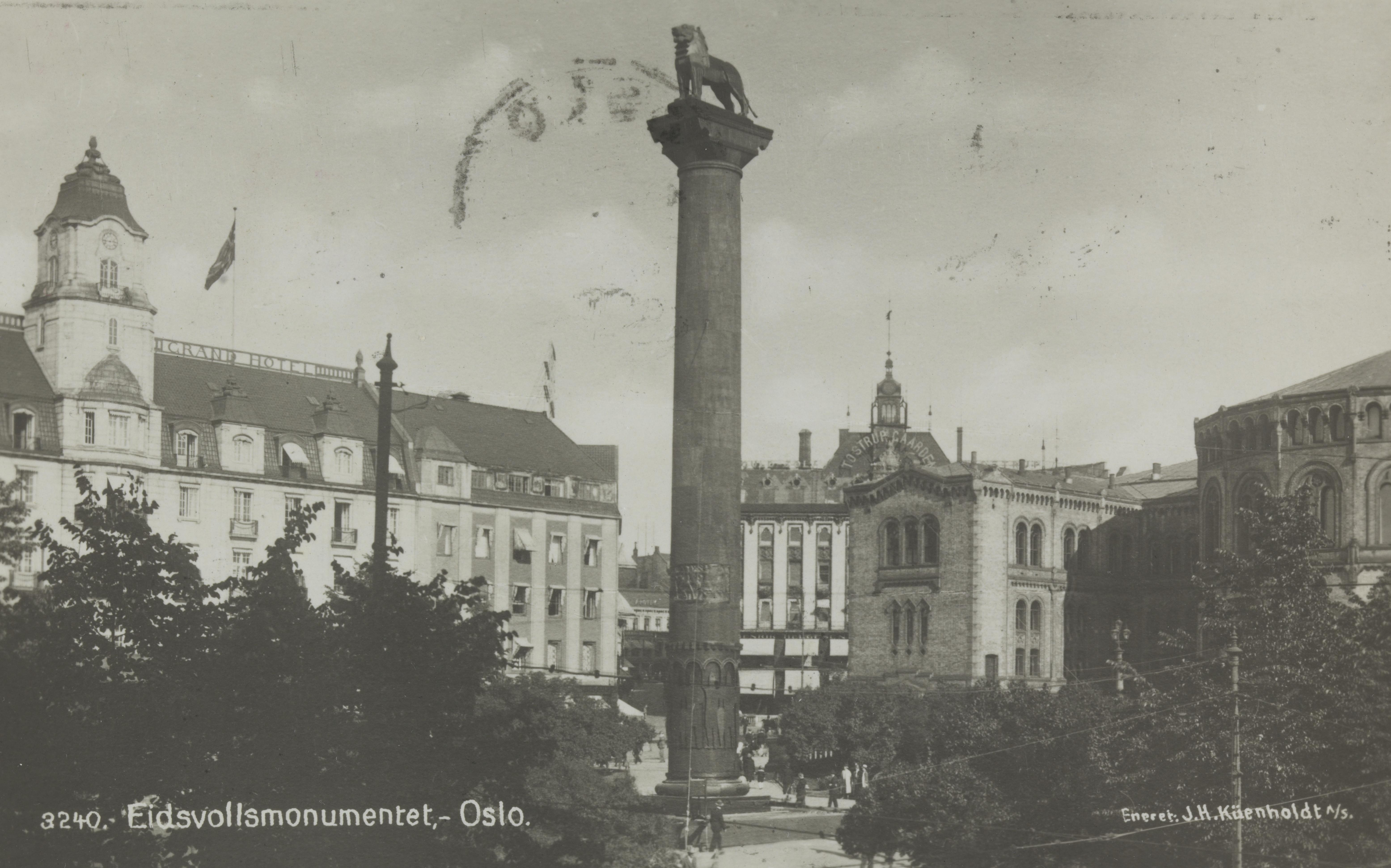 Bildet er hentet fra Nasjonalbibliotekets bildesamling Eidsvolls plass, Oslo, Oslo